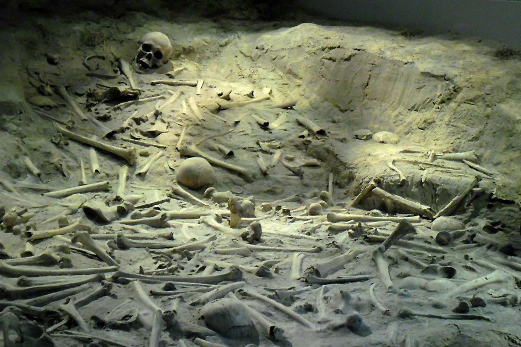 中文（中国大陆）: 江苏省南京市